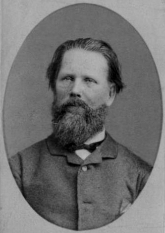 Алексей Иванович Корзухин. Фотография.